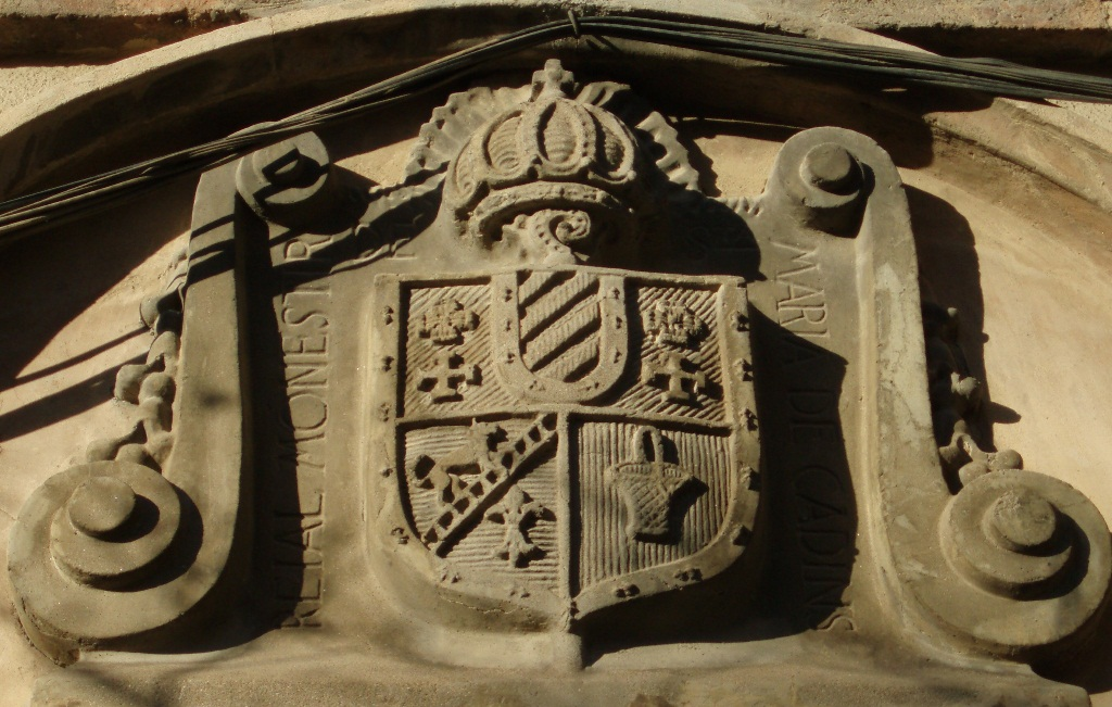 Escudo del antiguo monasterio de Santa María de Cadins en Salt. Actualmente es un centro cultural del Consejo Comarcal del Gironés.